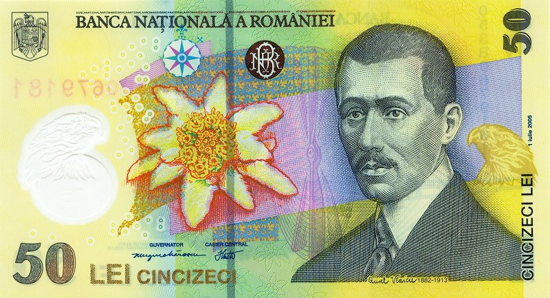 50 Leu anverse